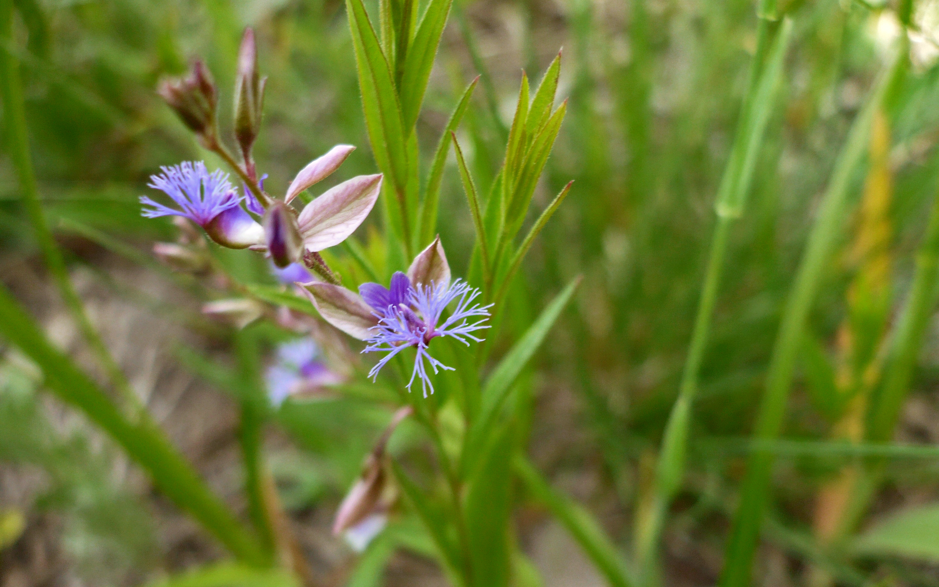 Истод сибирский. Балка Каменный лог, бассейн реки Корень, Белгородская область. 2009 г. Из коллекции родового экопоселения «Кореньские родники».